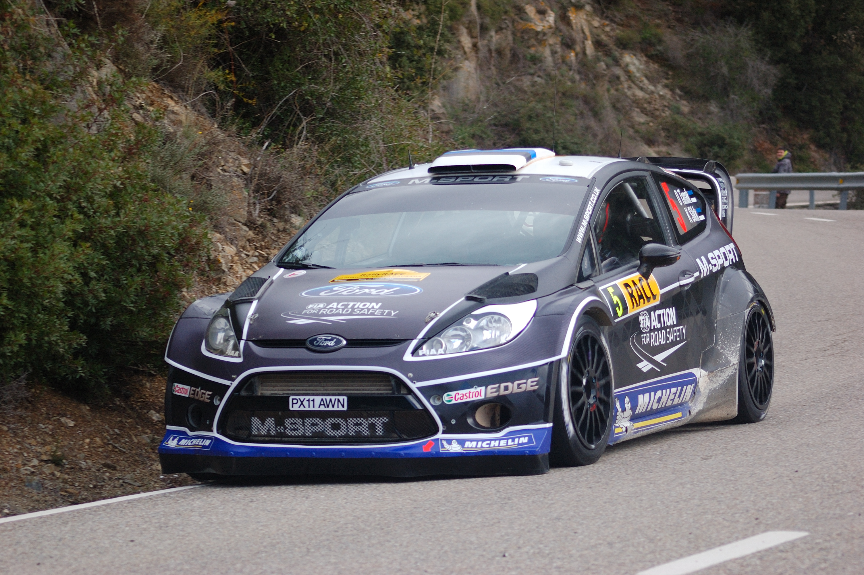 TÄNAK Ott / SIKK Kuldar